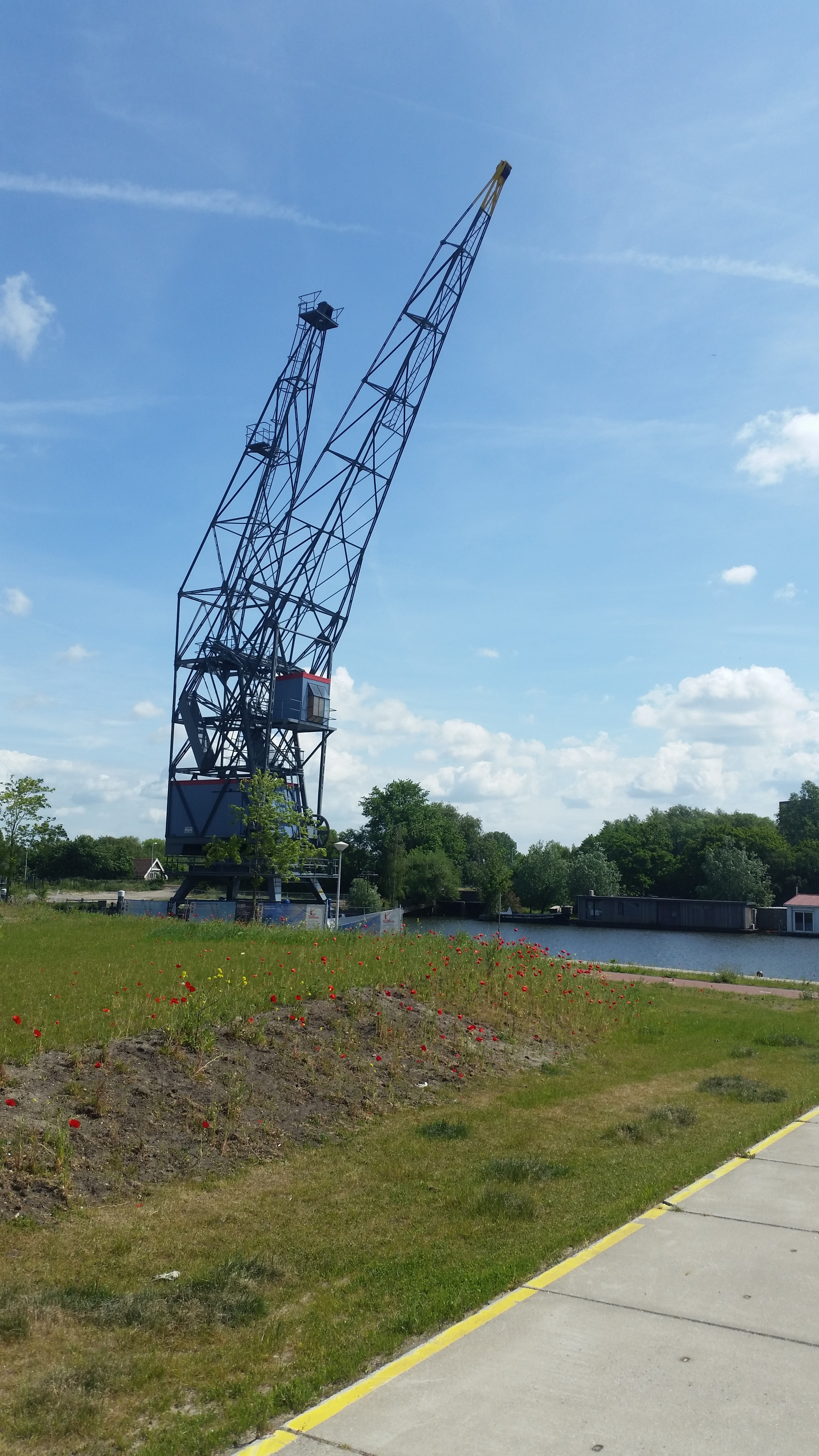 Hijskraan, Paard van noord aan de Bongerdkade in Tuindorp Oostzaan